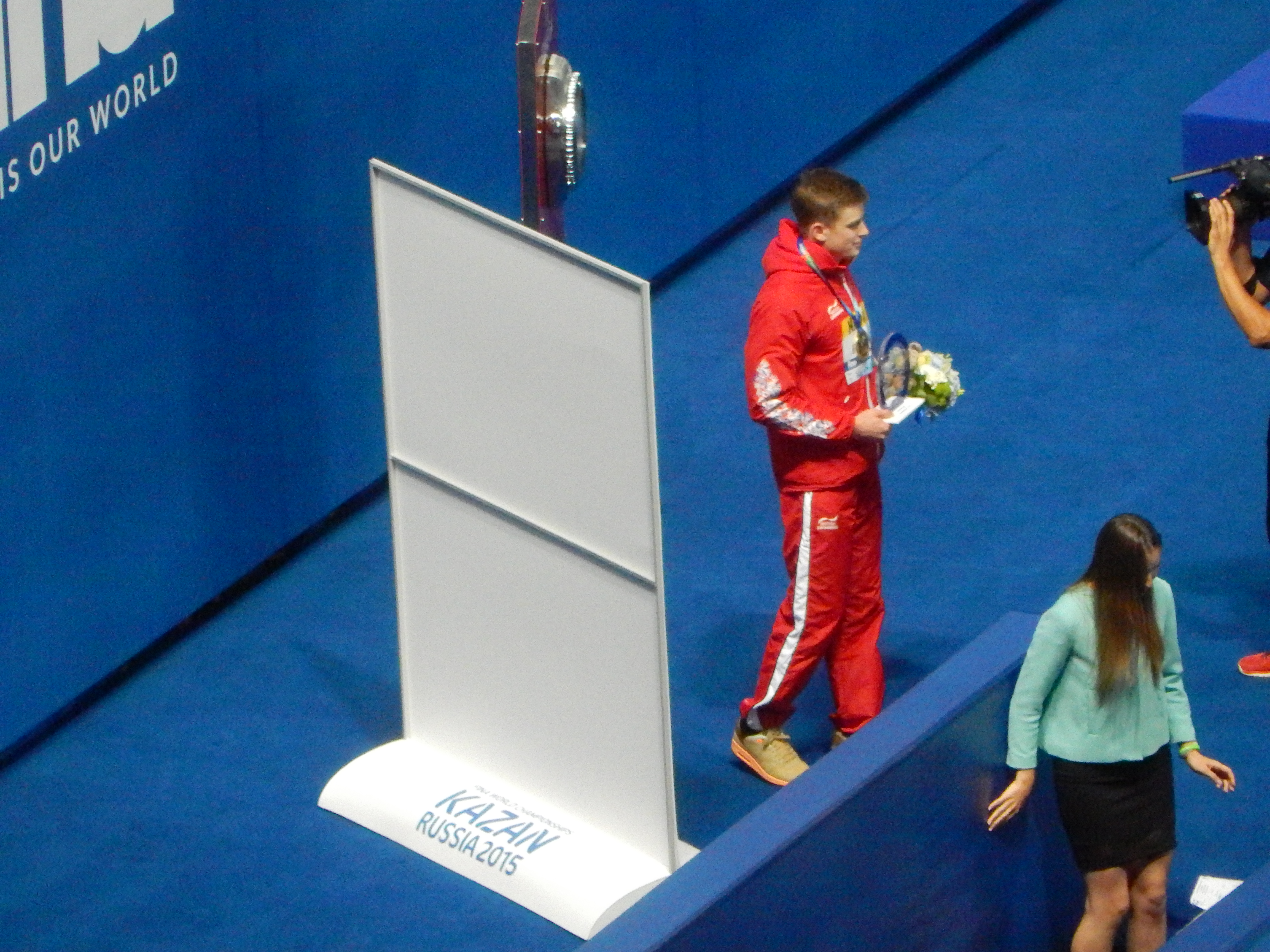 Награждение обладателя мирового рекорда Адама Пити в Казани